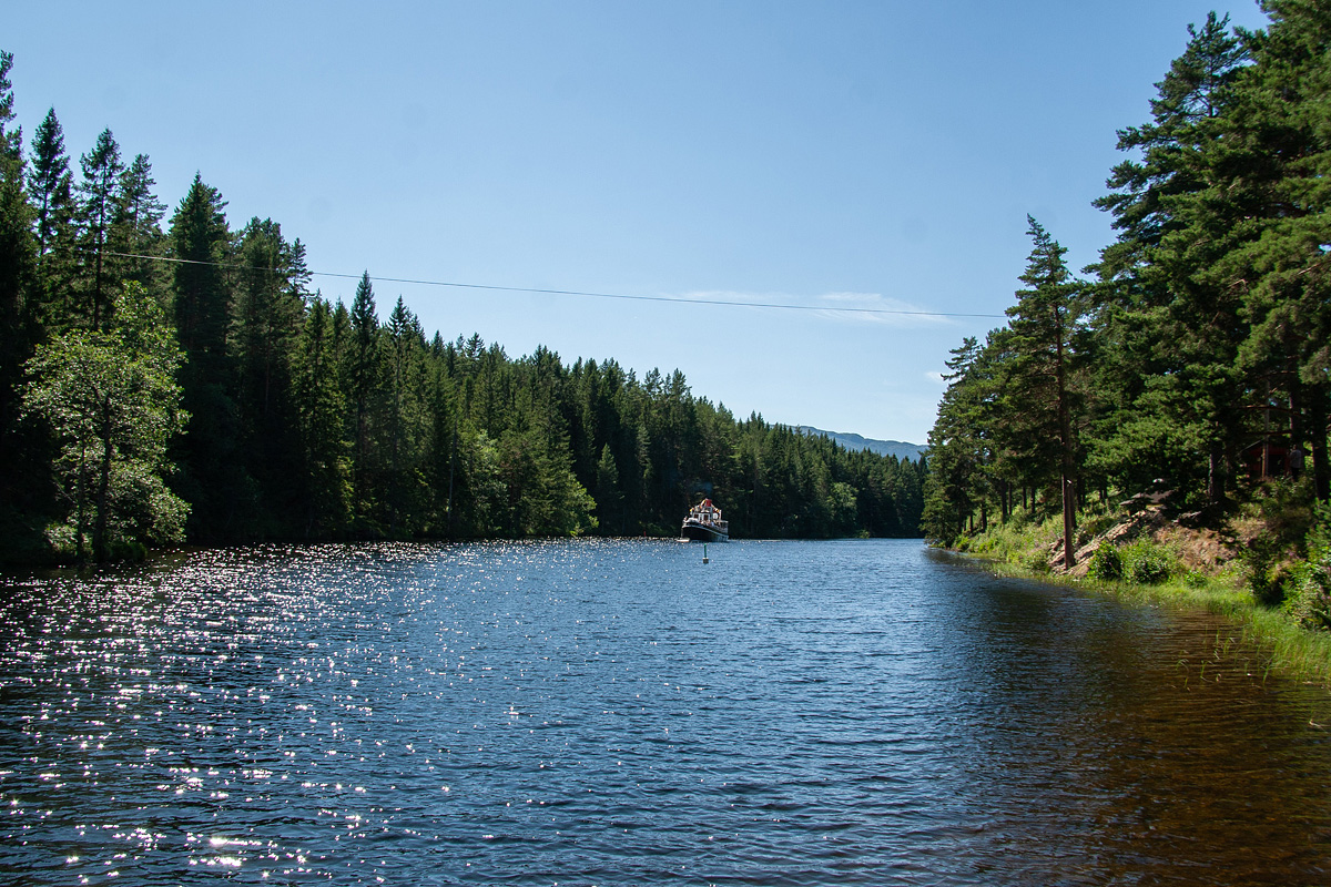 MS «Fram» på vei ned Roholdtåi.